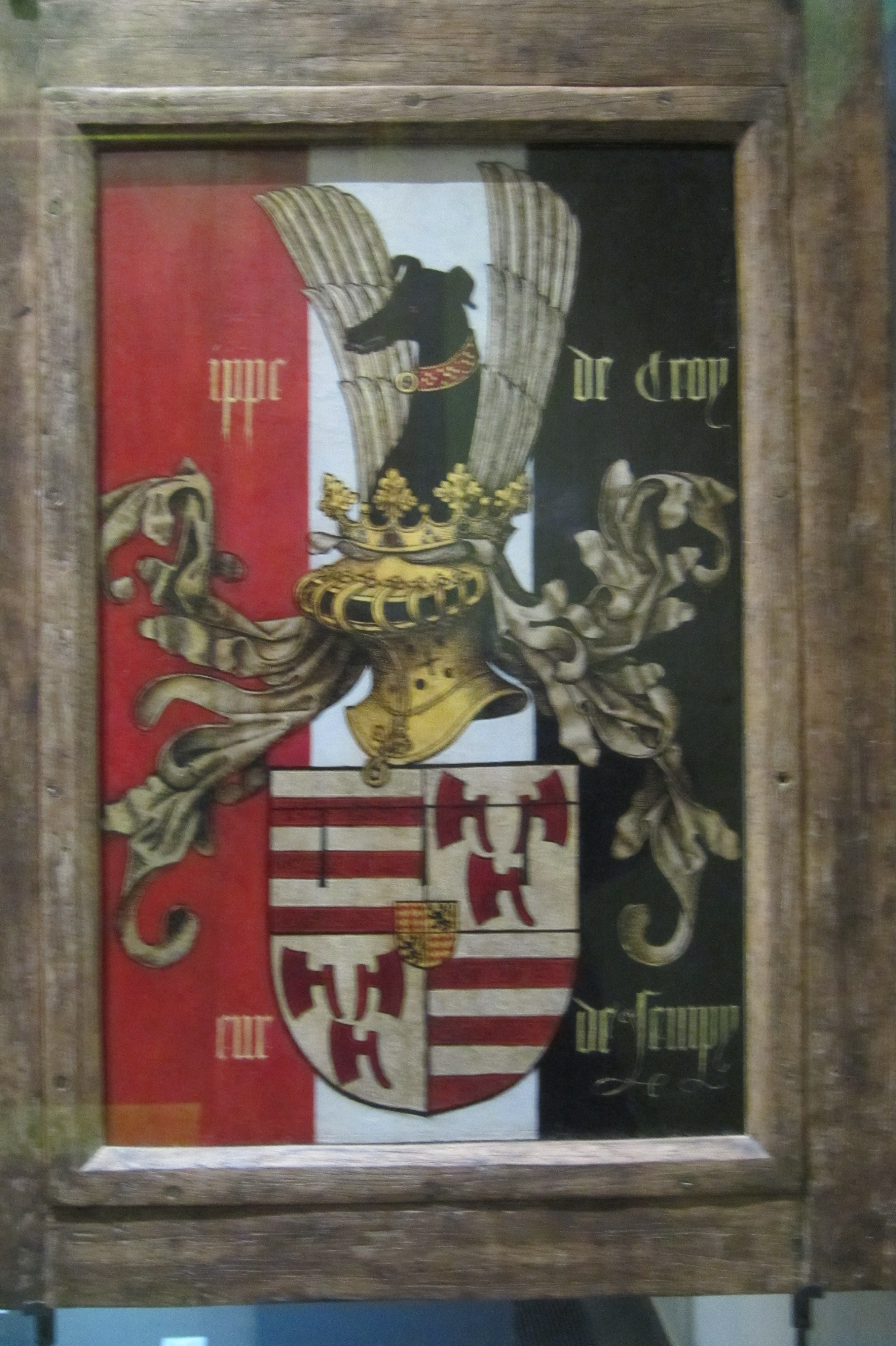 Wapenschild van Philippe de Croy op achterzijde van zijn portret door Rogier van der Weyden (Museum voor Schone Kunsten Antwerpen)